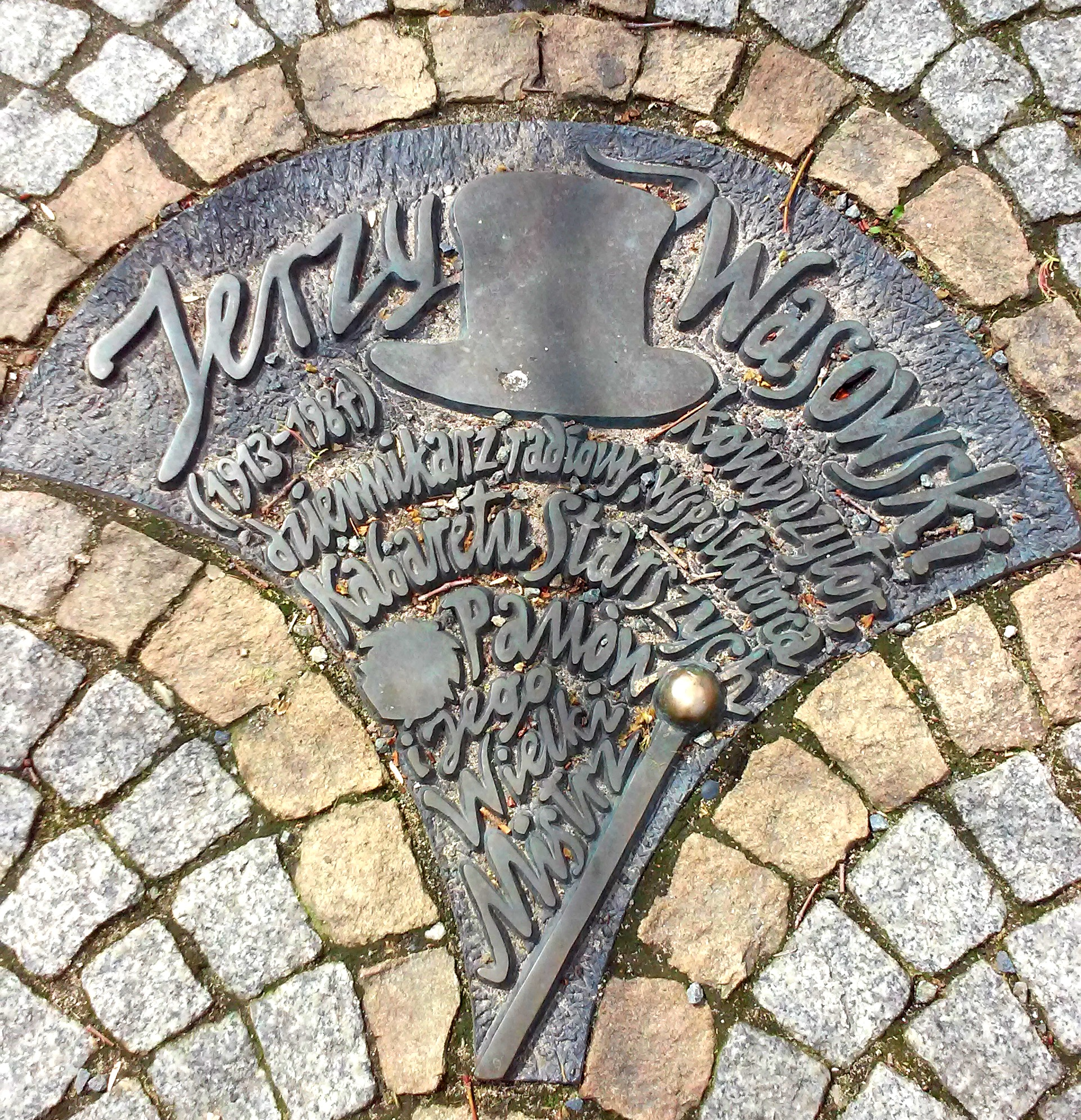 Legnica, Aleja Gwiazd Satyrykonu, tablica pamiątkowa - Jerzy Wasowski